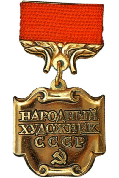 Знак «Народный художник СССР». Изображение с удостоверения к знаку.